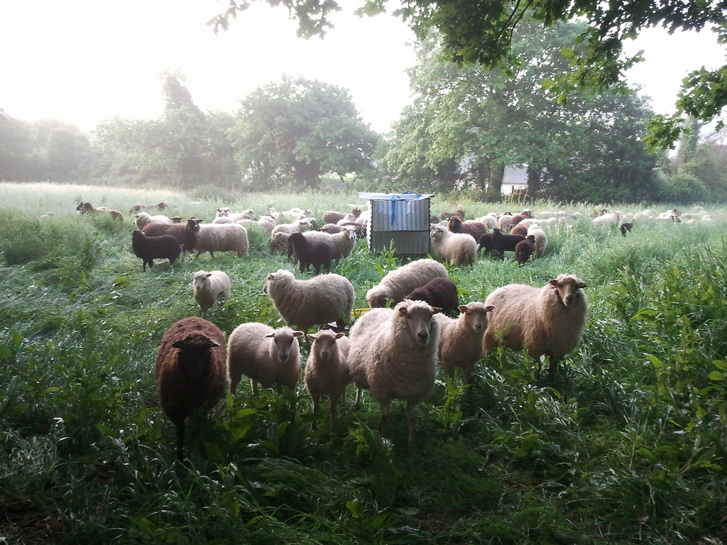 Moutons de la race Landes de Bretagne Troupeau de la ferme de l'Alinière, Brécé, Ille-et-Villaine